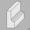 Anlauf (Bauteil)